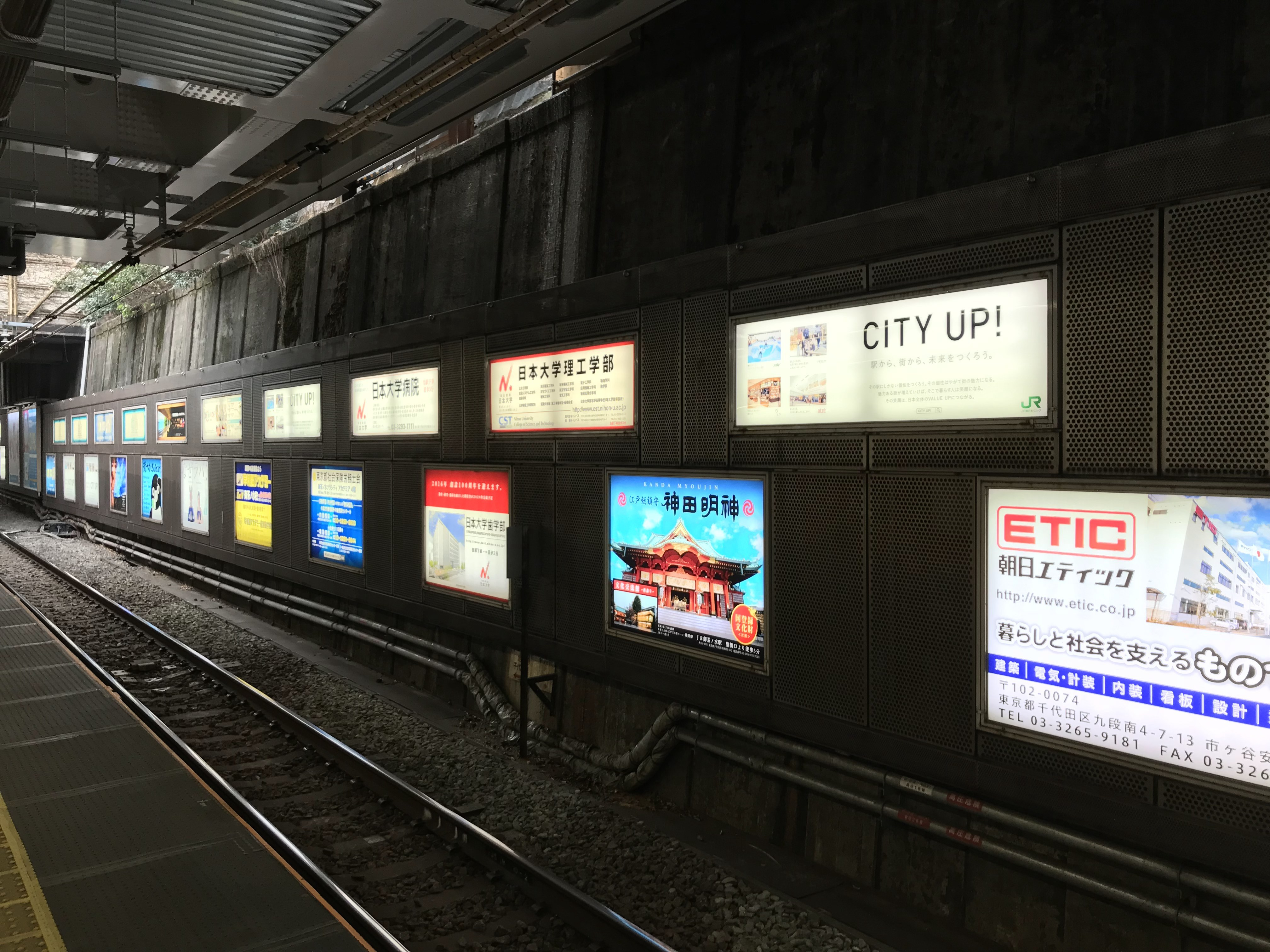 日本の駅における電飾看板広告の例。2019年2月15日御茶ノ水駅にて撮影。